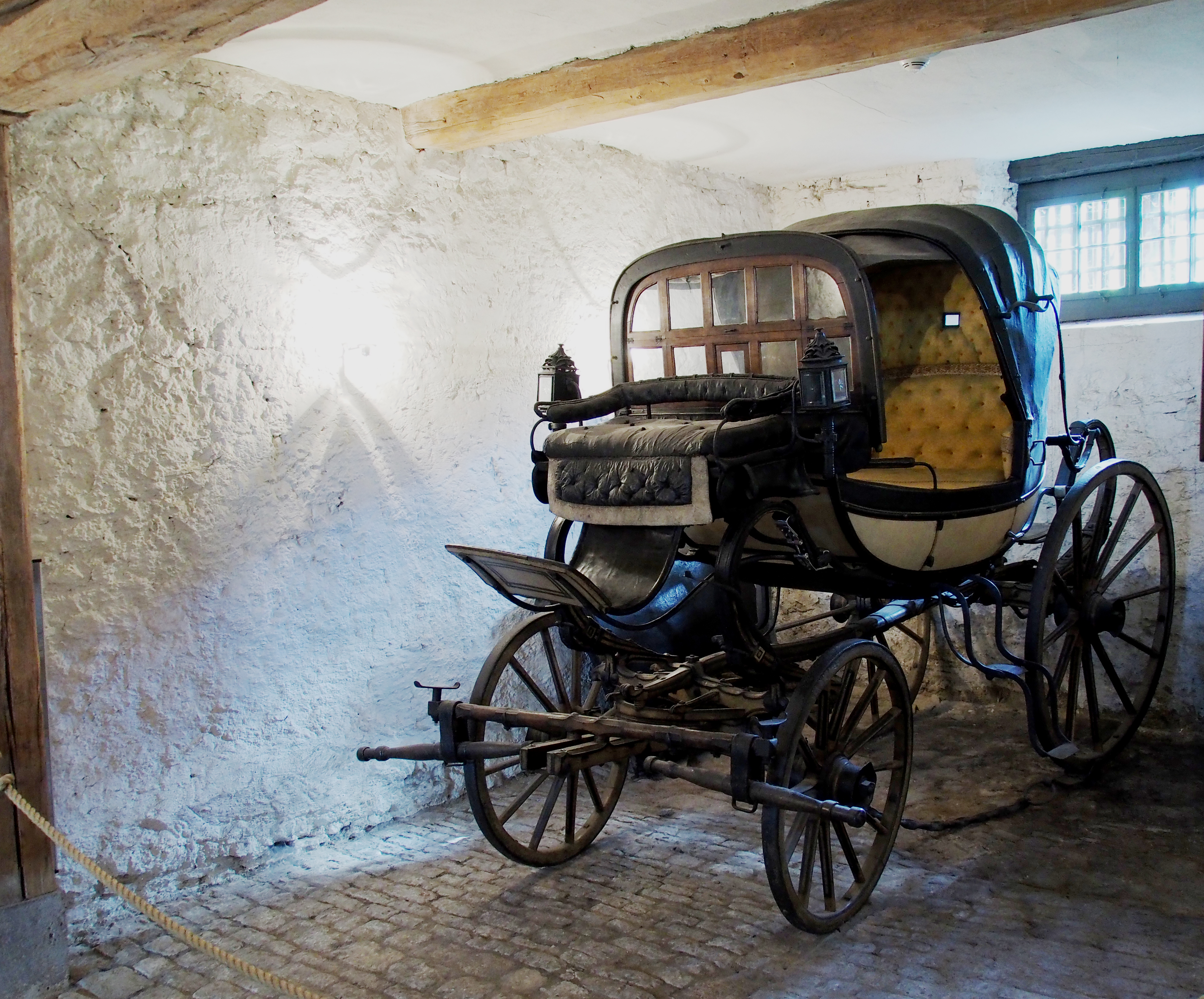 Goethes "Batarde" Kutsche, für Stadtfahrten und kleinere Ausflüge (1992 renoviert). Standort Remise in Goethes Wohnhaus (Weimar)